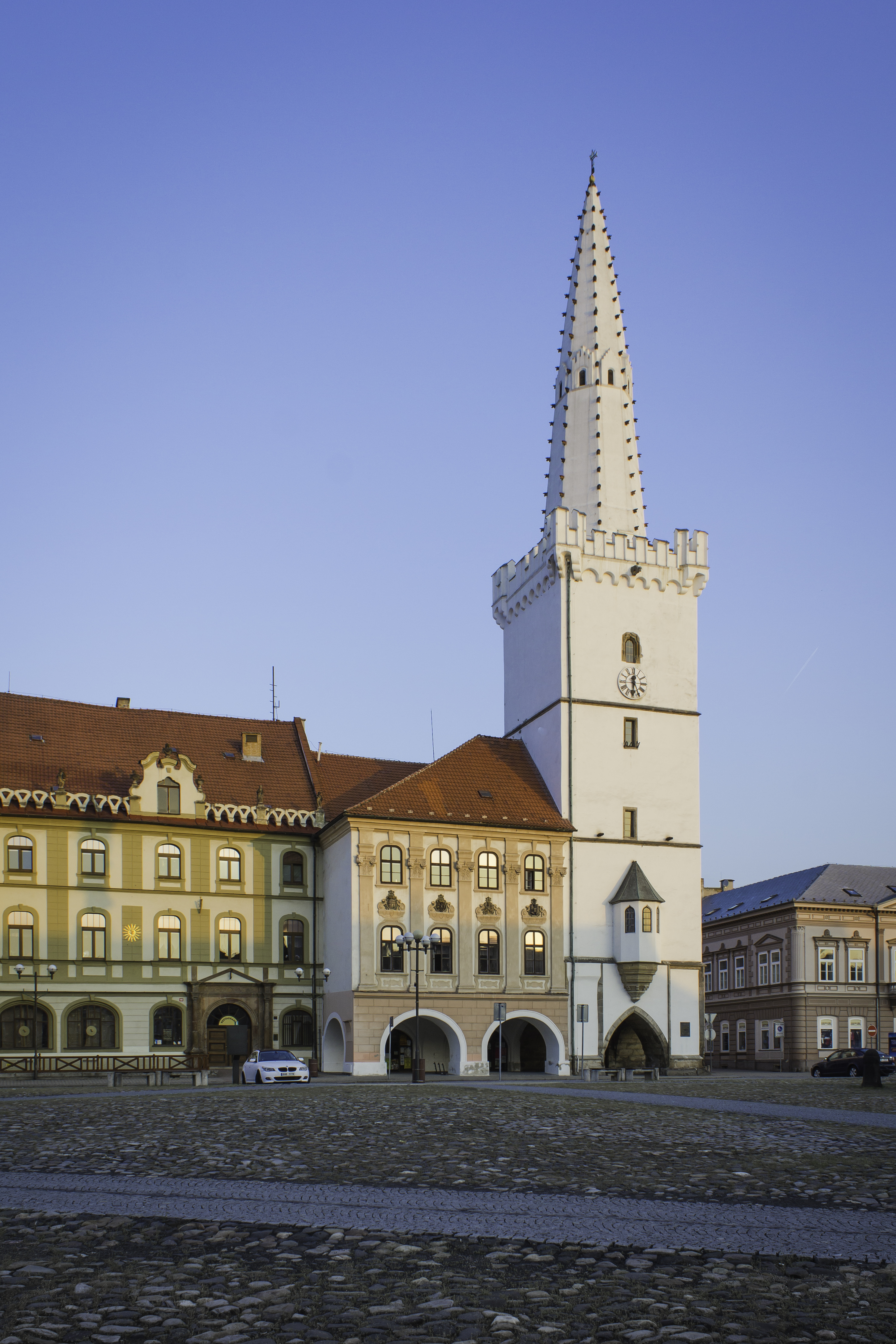 Radniční věž v Kadani